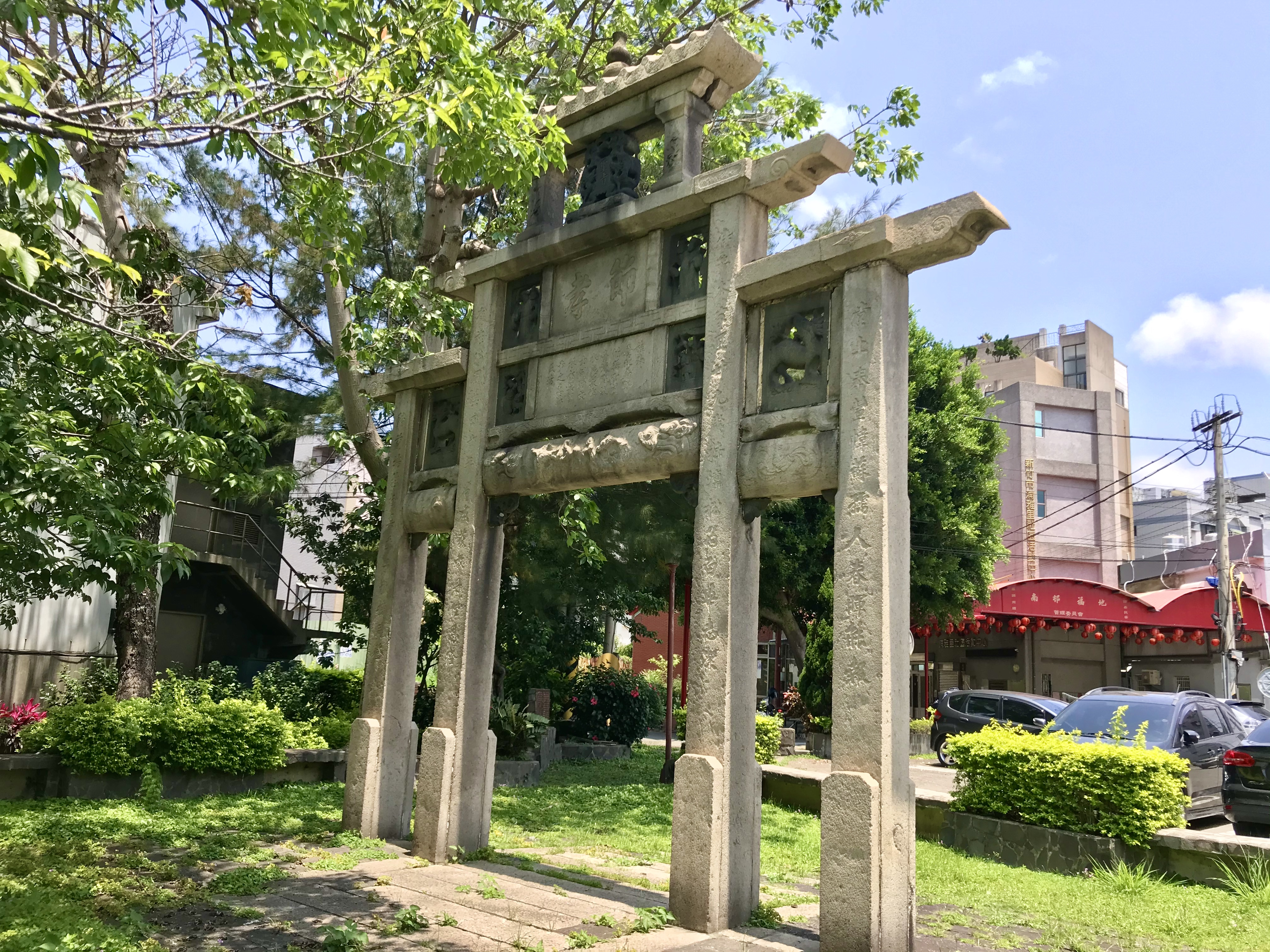 中文（台灣）: 蘇氏節孝坊與南邨福地